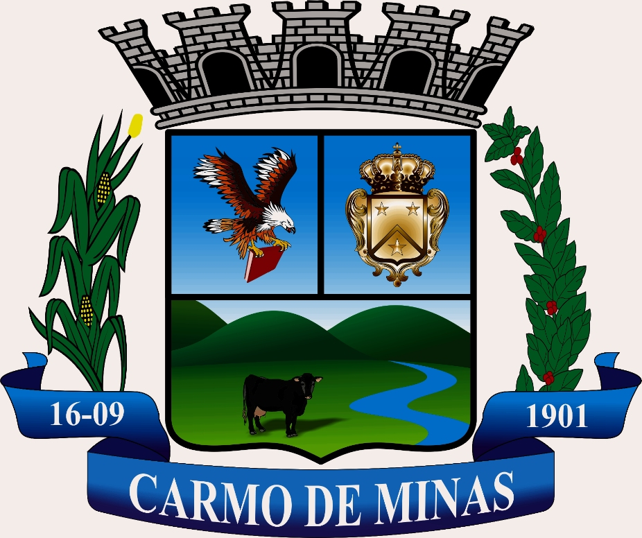 Brasão de Carmo de Minas